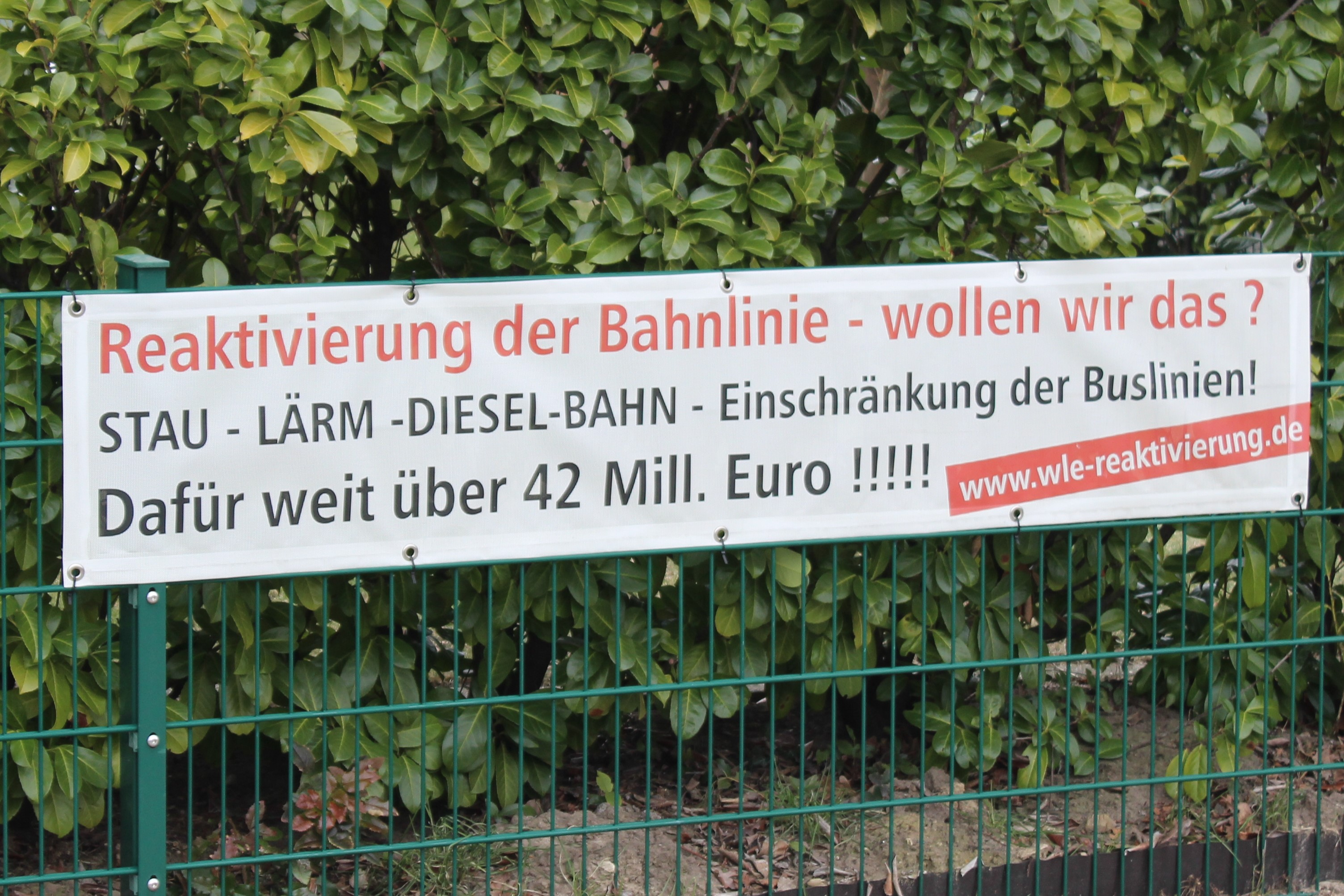 Banner, die gegen die WLE-Reaktivierung von Bürgern zwischen Sendenhorst und Münster über 100 mal installiert wurden